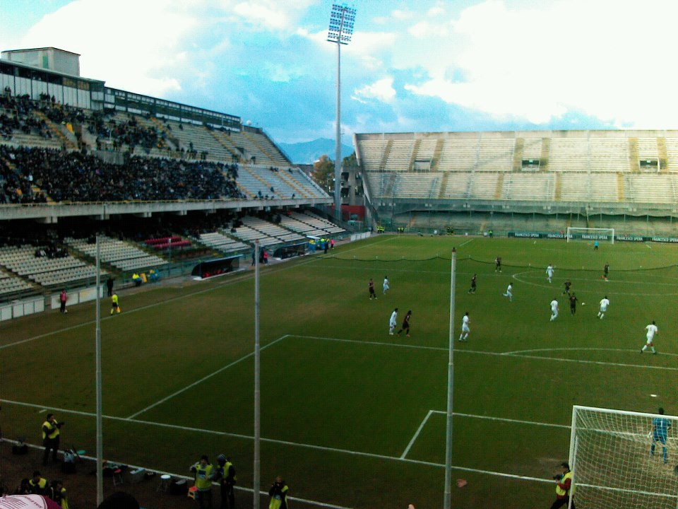 Salernitana Teramo 3-1 (22-12-12), gara che consacra Campione d'Inverno di Lega Pro Seconda Divisione la Salernitana 2012-2013. Primo tempo, prima dei gol